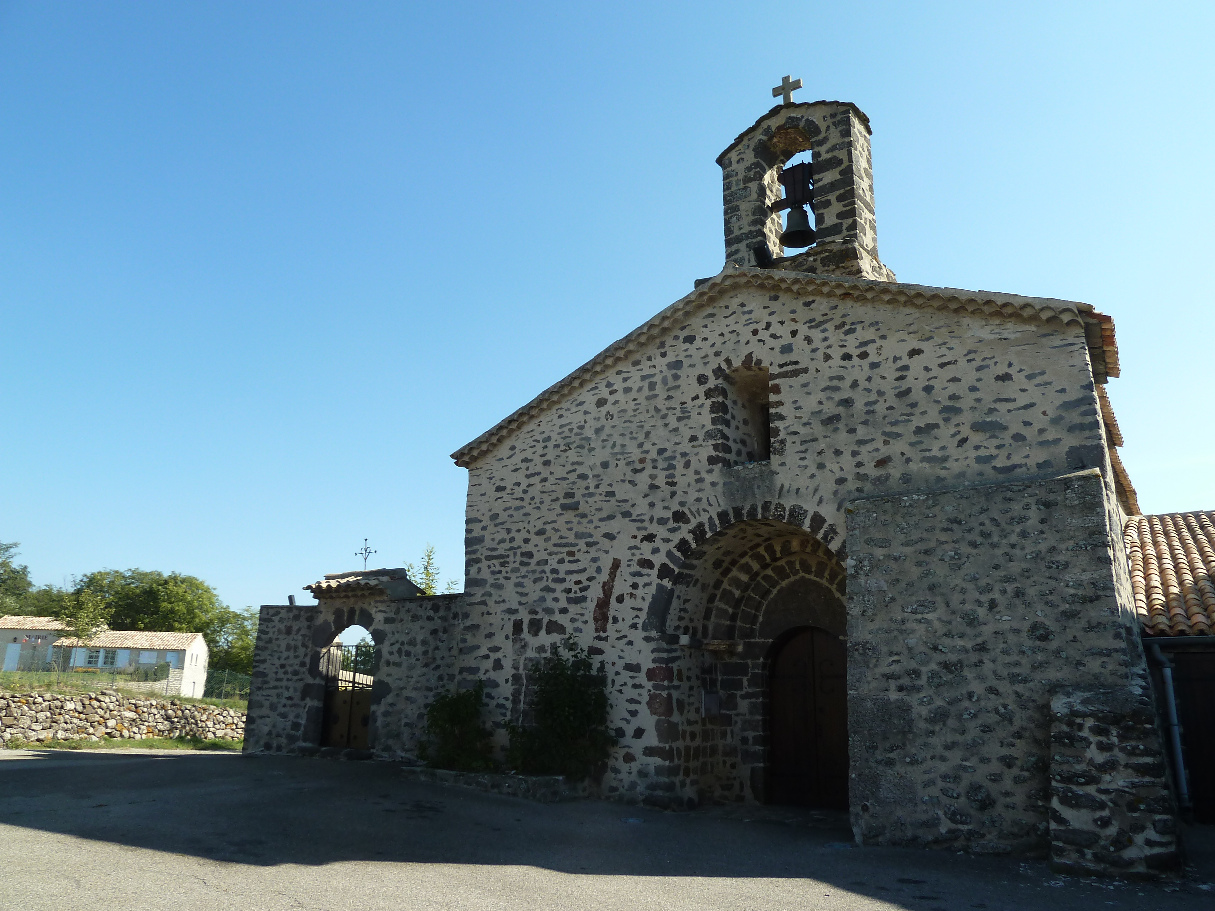 Église Saint-Genest, (Inscrit, 1974) .